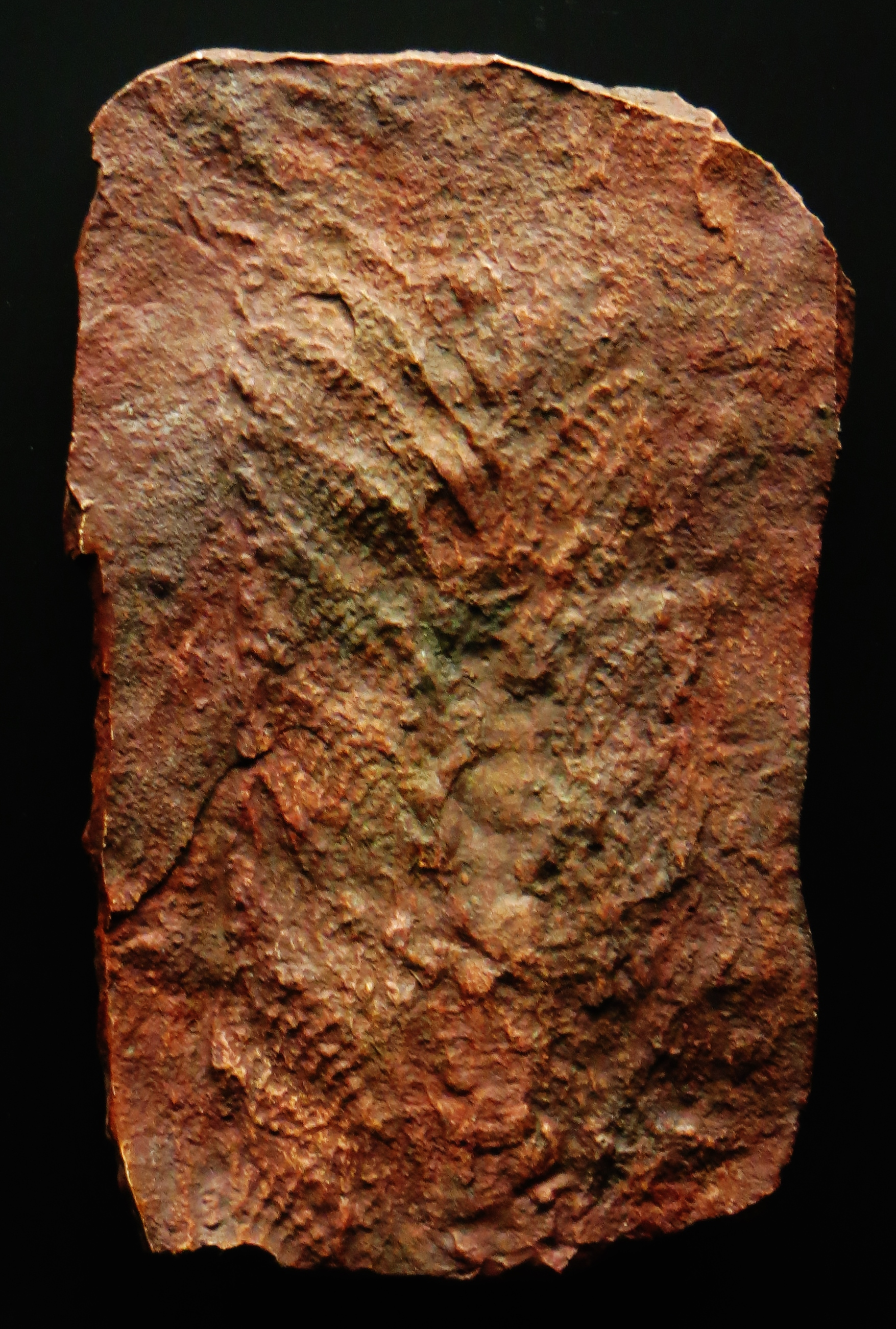 Took the picture at Senckenberg Museum, Frankfurt